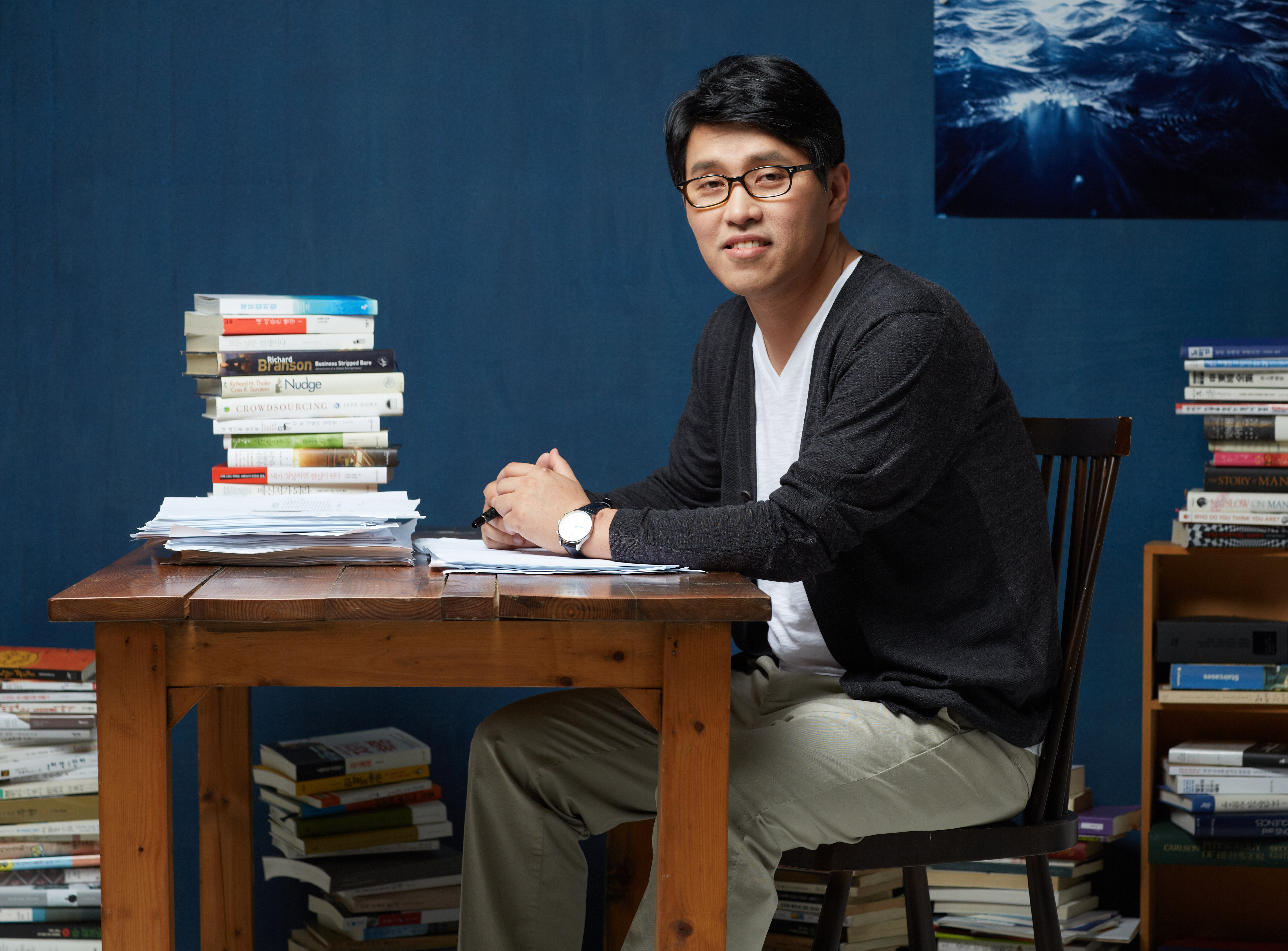 2013년 6월 5일 기업분쟁연구소 대표 변호사 조우성 사진.